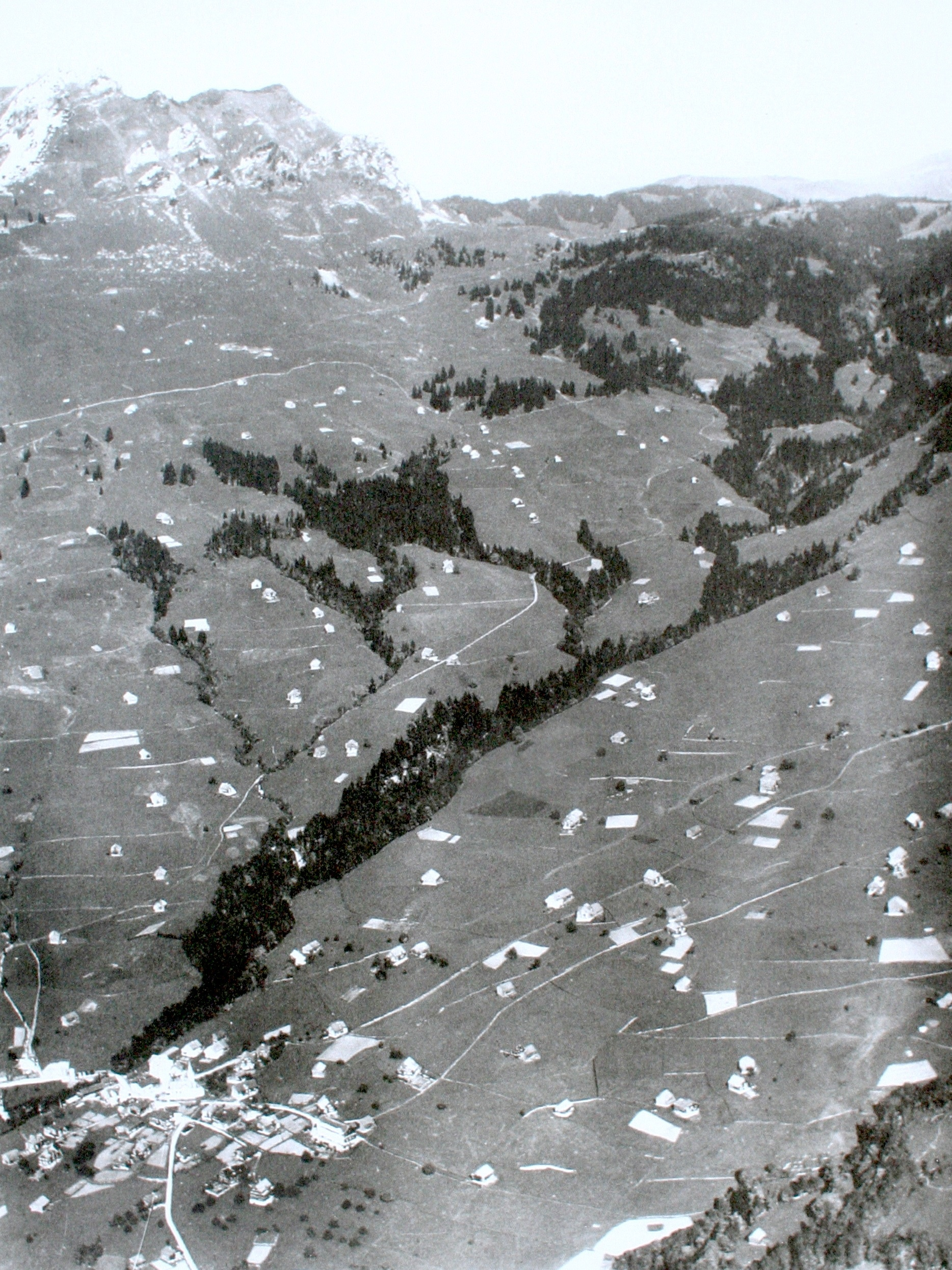 Amden vor 1920, Aufnahme von Walter Mittelholzer (1894 - 1937)